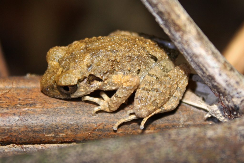 Leaf-litter Toad, (Leptolalax liui). Taken in Tai Po Kau.